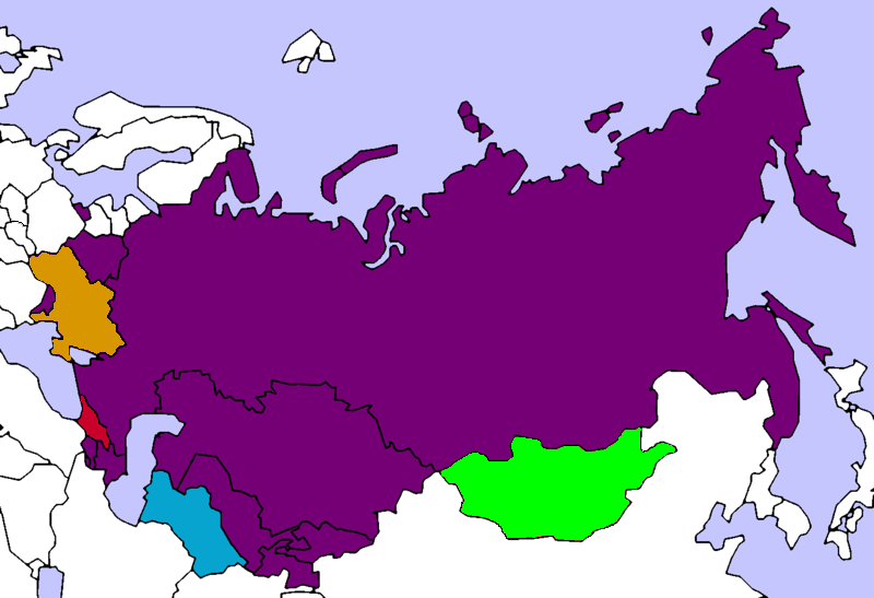 La CEI entre le retrait de la Géorgie en 2008 et le retrait de l'Ukraine en 2014